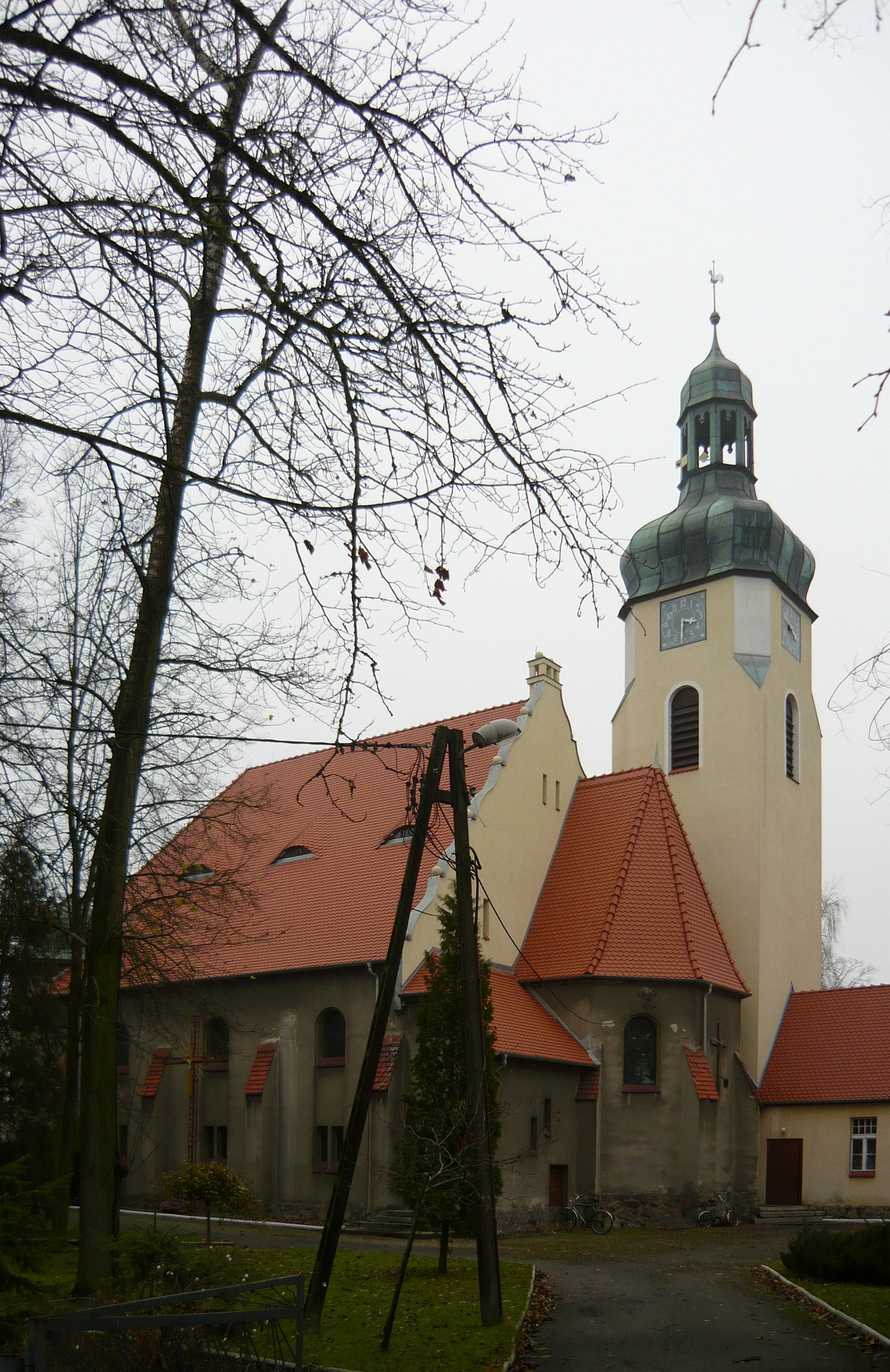 Kościół parafialny p.w. NMP Wspomożycielki Wiernych w Rojewie (powiat inowrocławski).